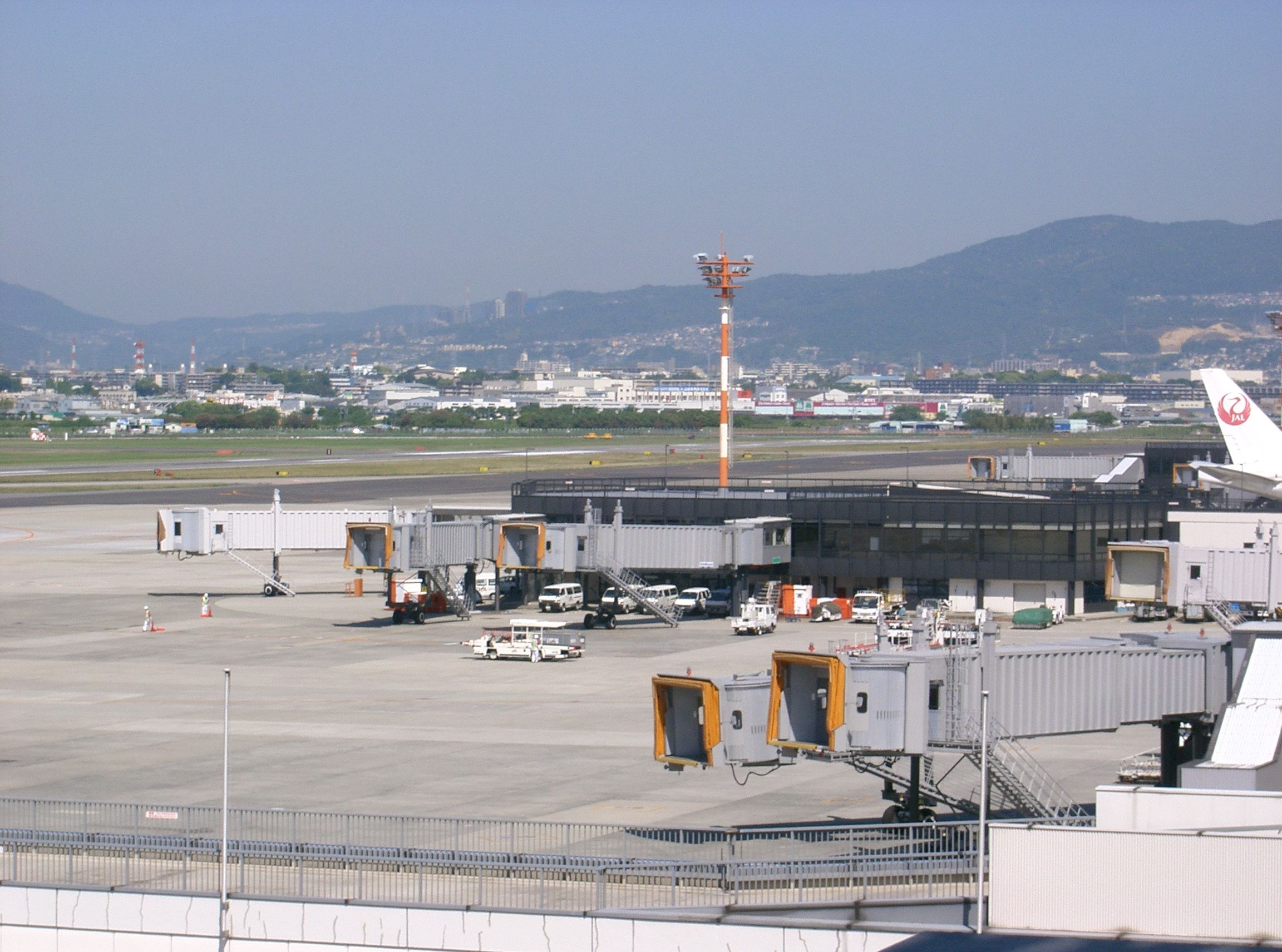 大阪国際空港